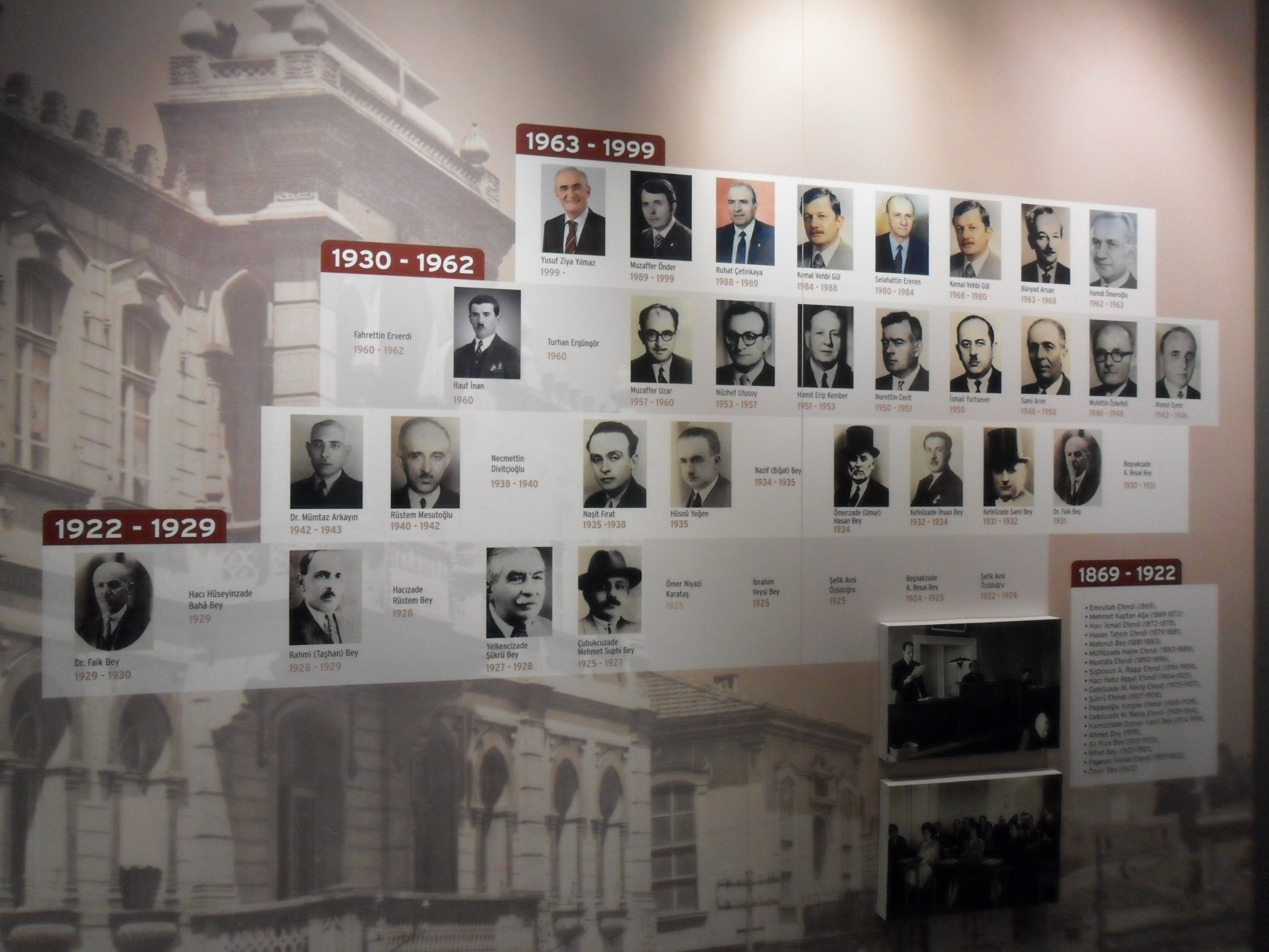 Samsun Kent Müzesi'nde yer alan Samsun belediye başkanları bilgilendirme panosu.